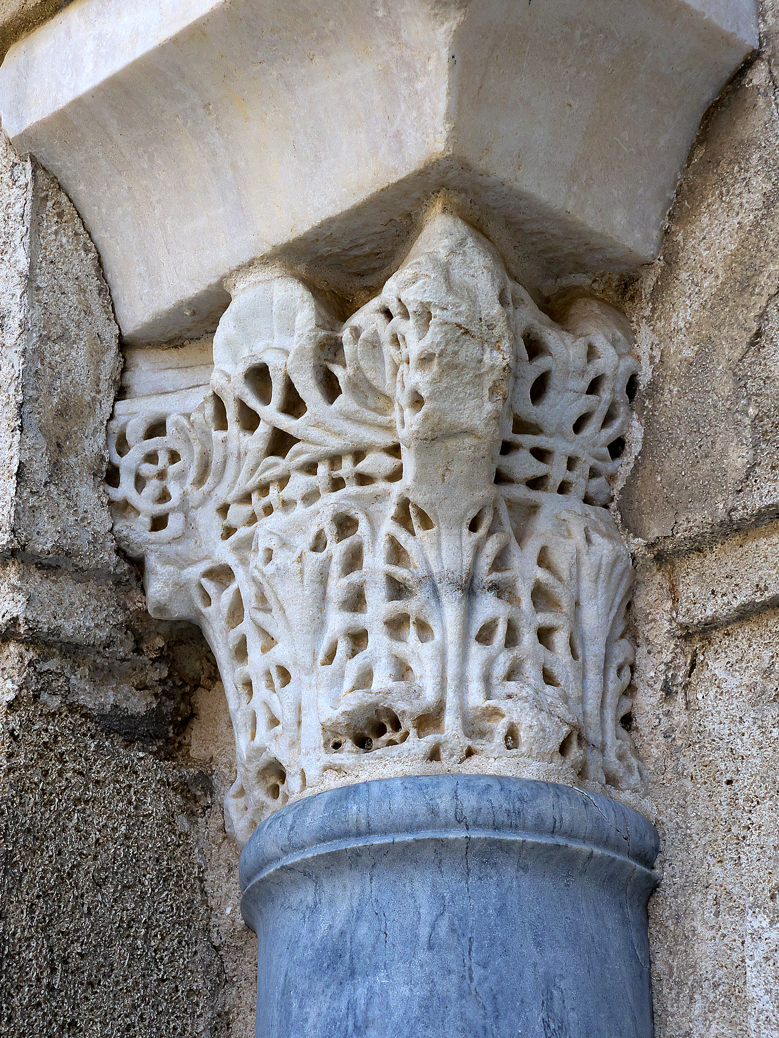 Fachada principal del Palacio del rey don Pedro, Sevilla. Capitel de tipo avispero reutilizado, con probable procedencia de Madīnat al-Zahrā’.